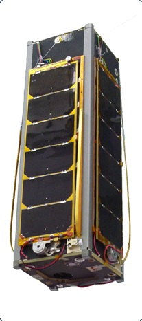 Satélite OPTOS con los paneles desplegables con configuración de lanzamiento